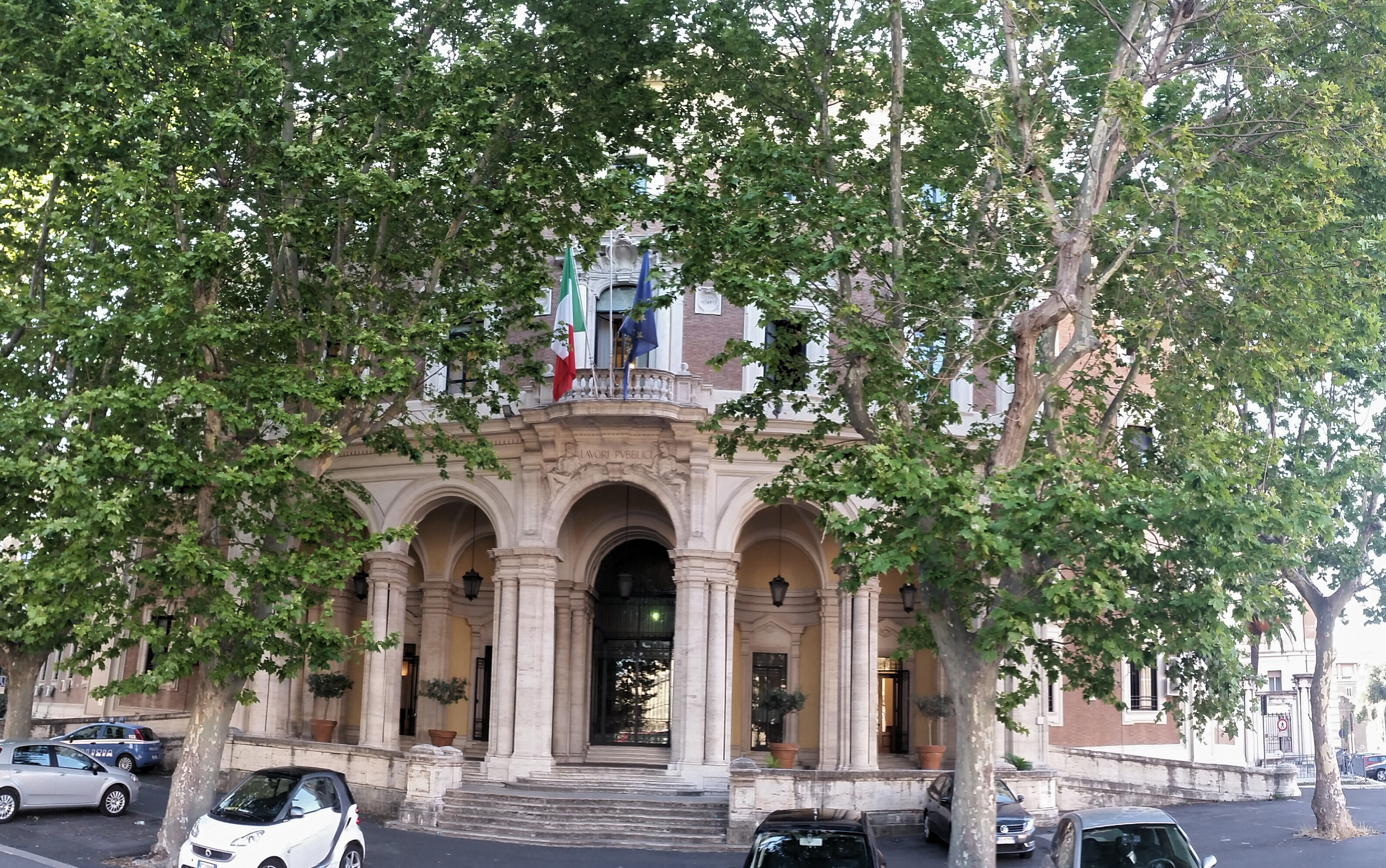 Sede del Ministero Infrastrutture e Trasporti a Roma, Porta Pia